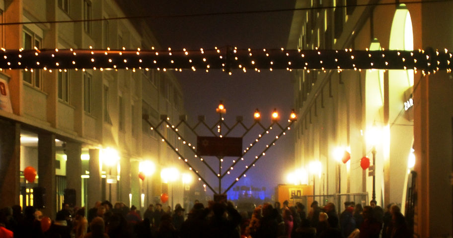 Lichterketten an einer Rohrleitung und einem Chanukkaleuchter